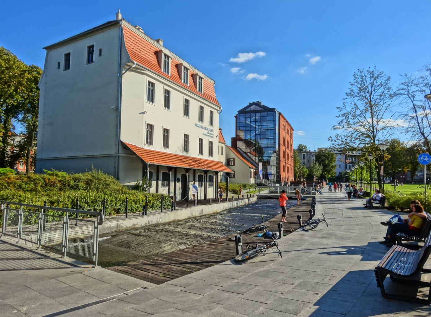 Kaskada Międzywodzie na Wyspie Młyńskiej w Bydgoszczy odtworzona w 2007 roku